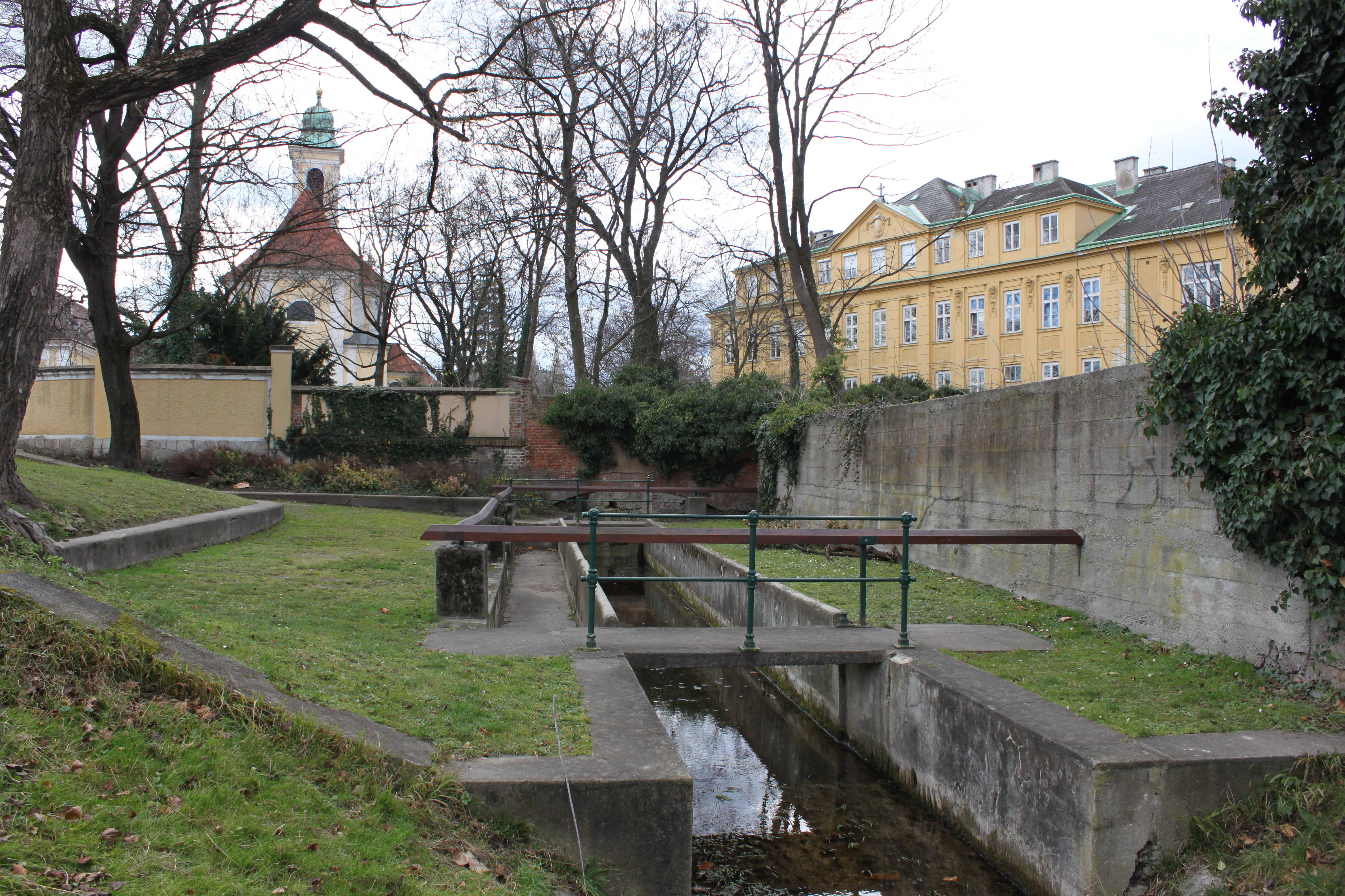 Schwabbänk, eine ehemalige Wäscheschwemmbank am Polierbach, erstmals 1816 urkundlich genannt, im Hintergrund links Vorstadtkirche (Wiener Neustadt), rechts die r.k. Schule Santa Christiana